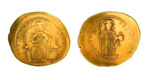 Բյուզանդիայի կայսր Կոնստանտին X-ի պատկերով հիստամենոն